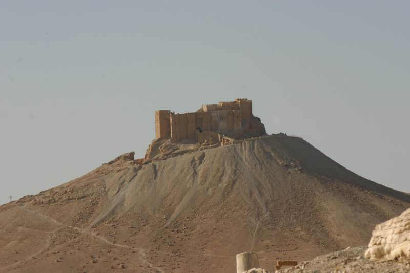 Qasr Ibn Maʿan eigenes Foto, public domain, Mewes 19:45, 30. Okt 2005 (CET)